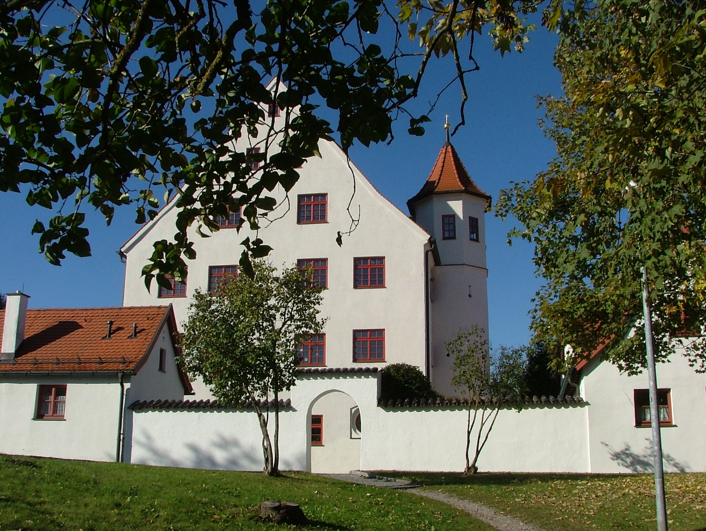 Rotschlössle, Kempten im Allgäu